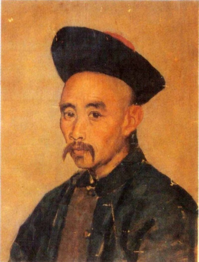 Легашев, Антон Михайлович Холст, масло.25 х 23,5 Государственный Русский музей. На обороте холста красным карандашом: 3770 приписывалось Легашову Г. Р. М. Инв. № 7828; простым карандашом: из коллекции А. Бенуа № 46 акт 29/IX 33г. Поступил: в 1933 из собрания А. Н. Бенуа (Ленинград)